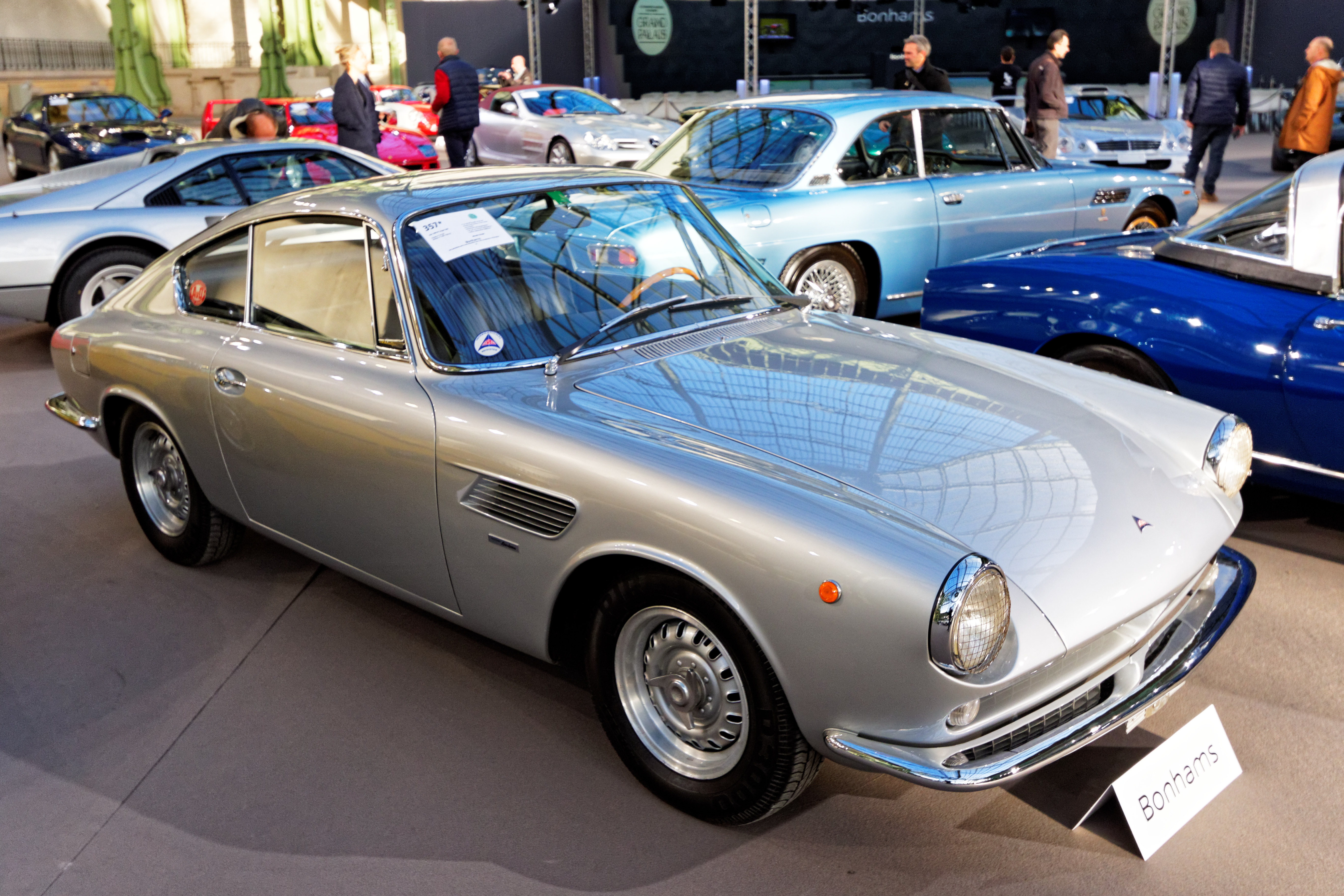 Un des véhicules présenté lors de la vente aux enchères Bonhams 2016 au Grand Palais de Paris.